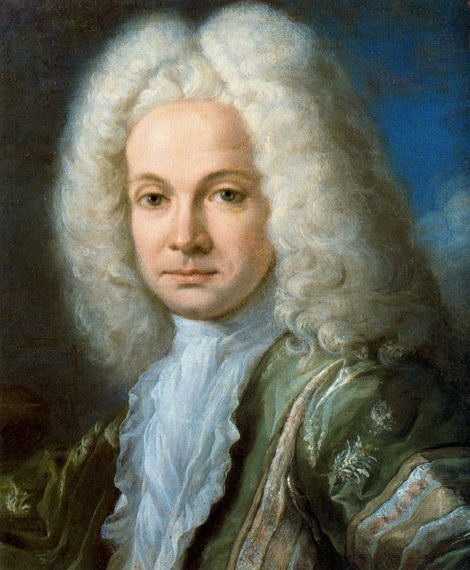 Autorretrato del pintor español Miguel Jacinto Meléndez (1679-1734).